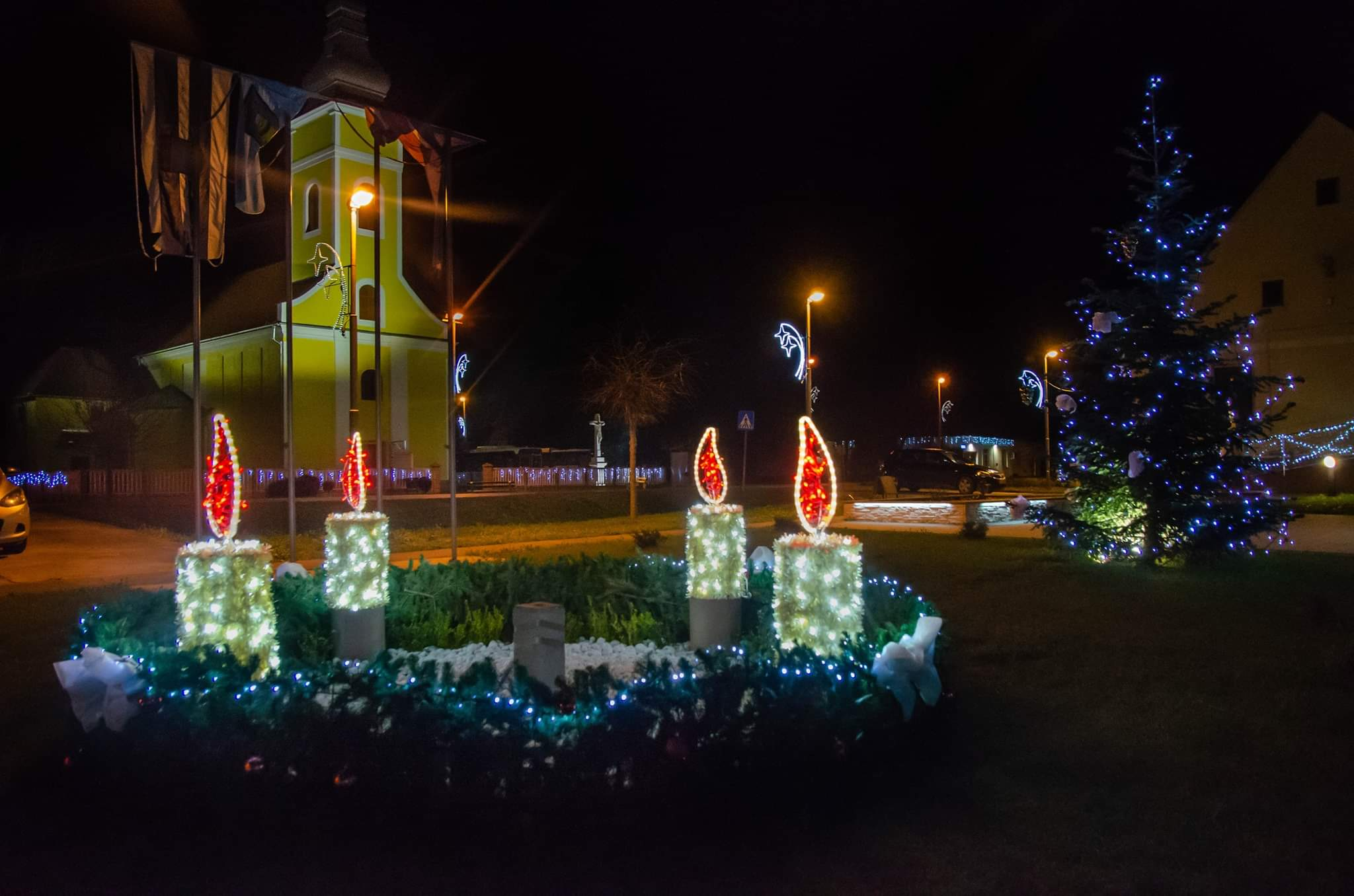 Centar Vrbice